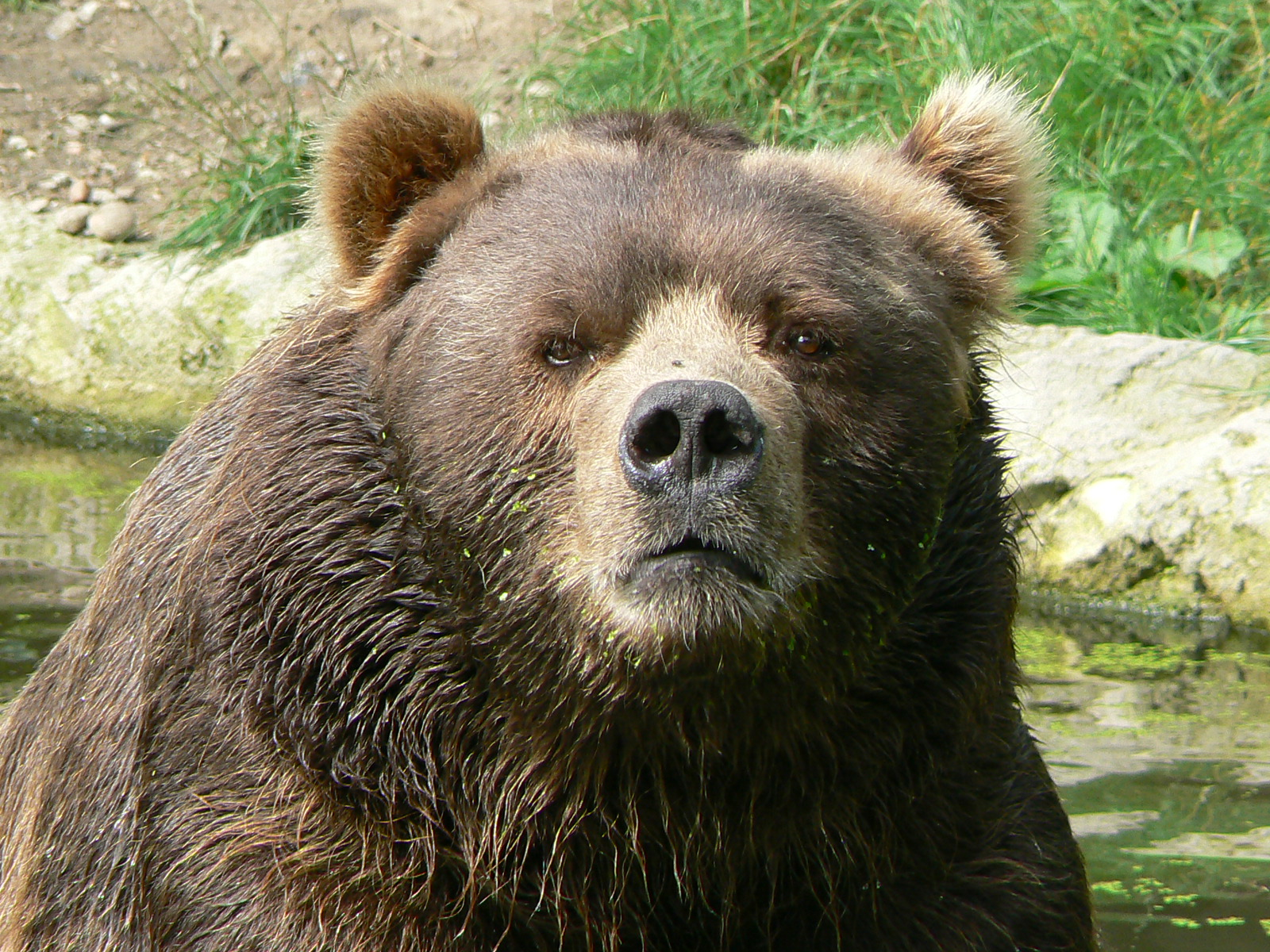 Ursus arctos middendorffi /kodiak bear/ Kodiakbär